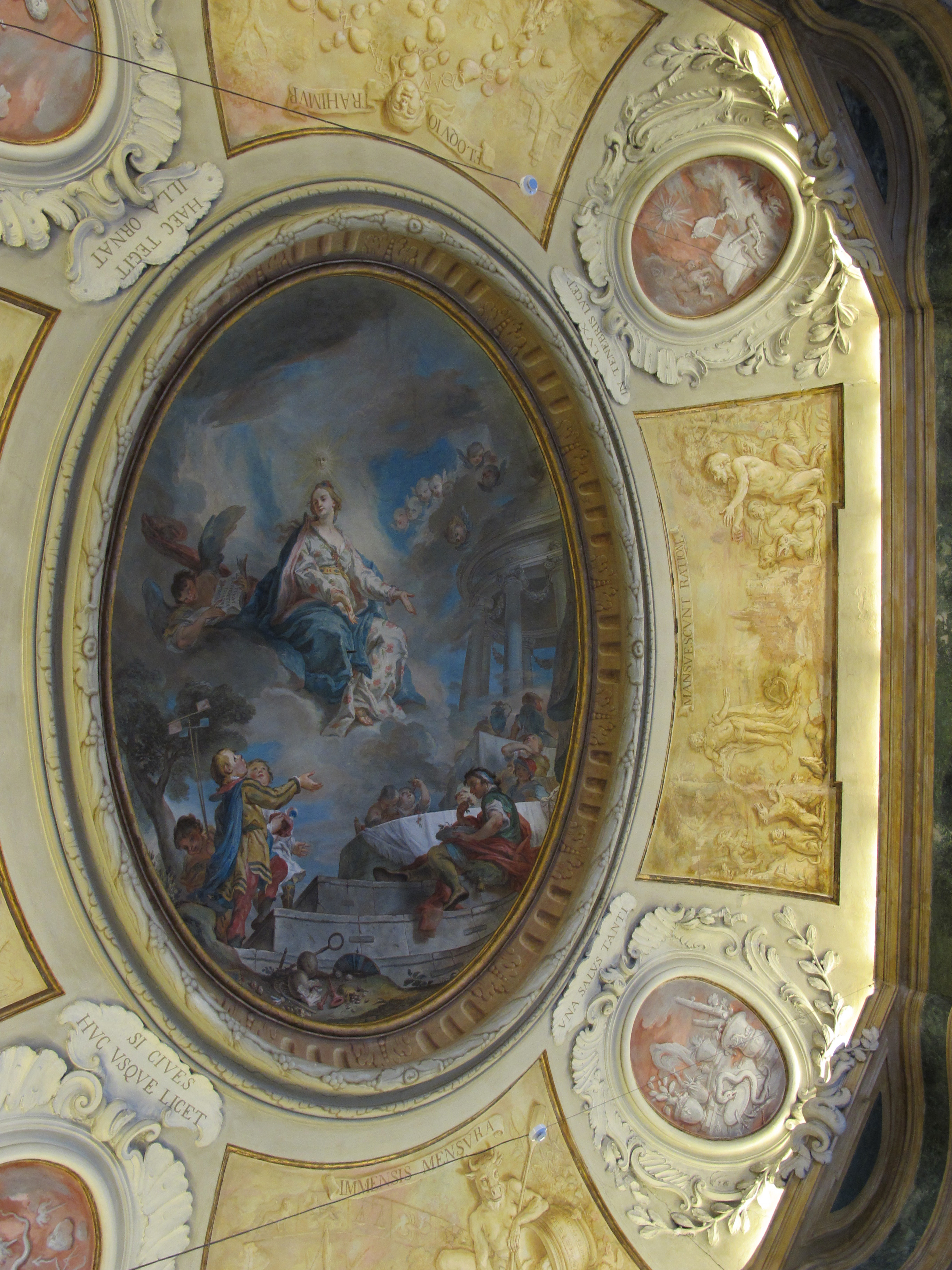 Giuseppe Antonio Ghedini, Sapienza, 1773, Palazzo Paradiso This is a photo of a monument which is part of cultural heritage of Italy.